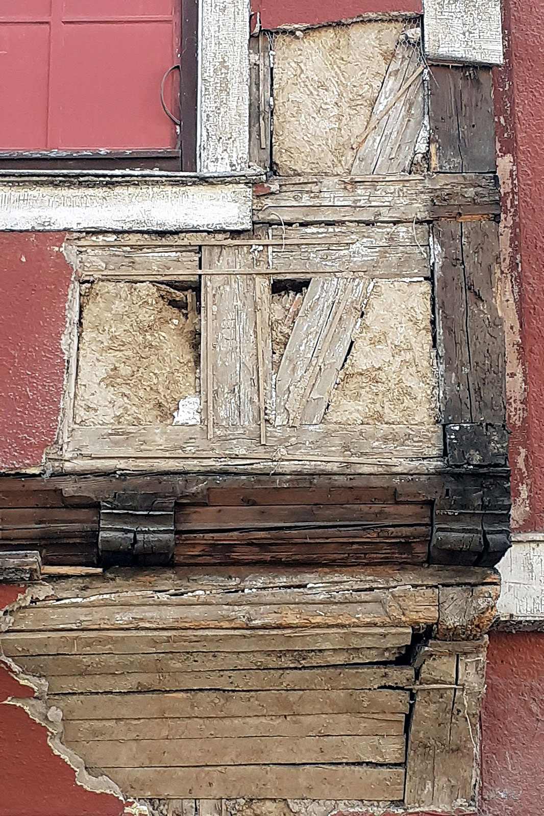 Gotha, Hauptmarkt 18, Haus zum Roten Löwen, Detai Fachwerkerker (kurz vor dem Abriss Mai 2020)